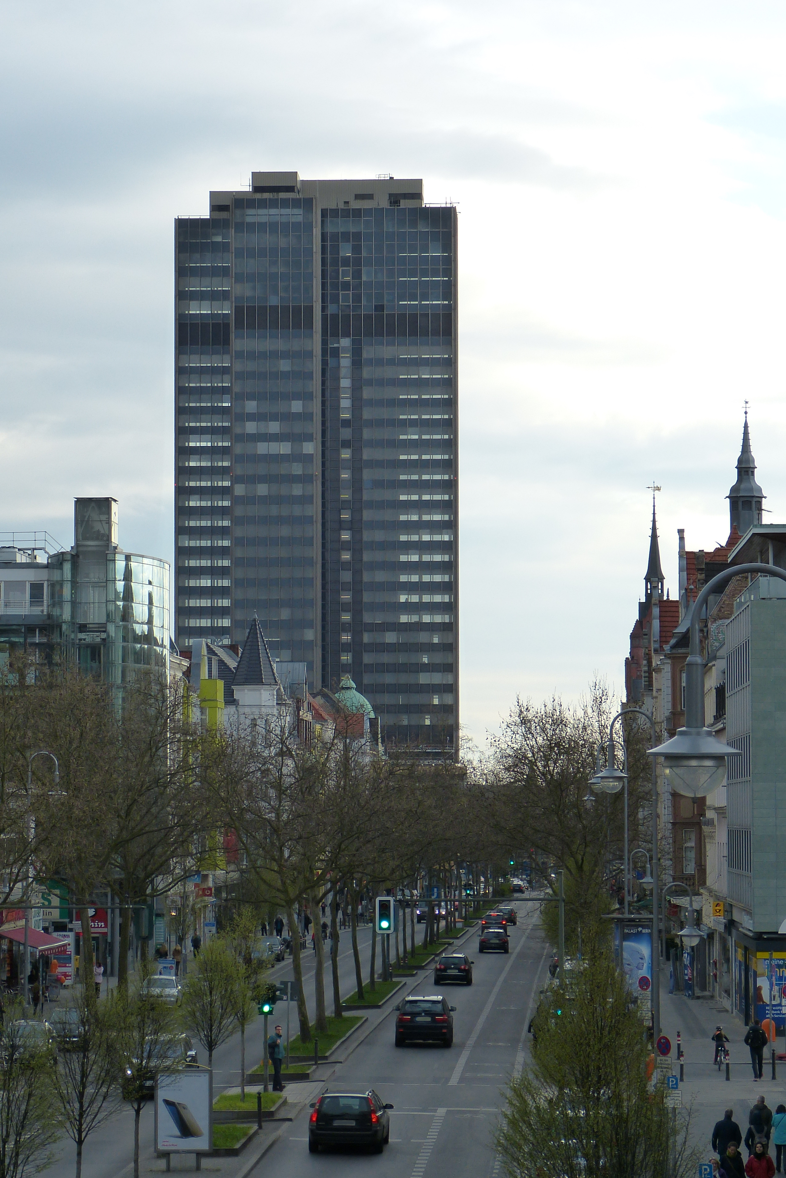 Berlin-Steglitz, Schloßstraße, Hochhaus "Steglitzer Kreisel", Blick aus Richtung Norden von der Joachim-Tiburtius-Brücke